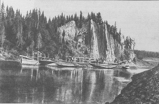 Барки на Чусовой